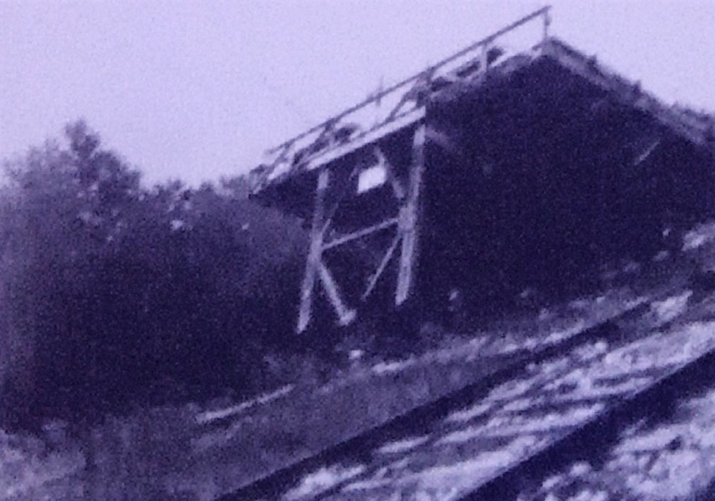 Ferrovia marmifera di Lasa - Piattaforma su piano inclinato con velocità 1 m al s